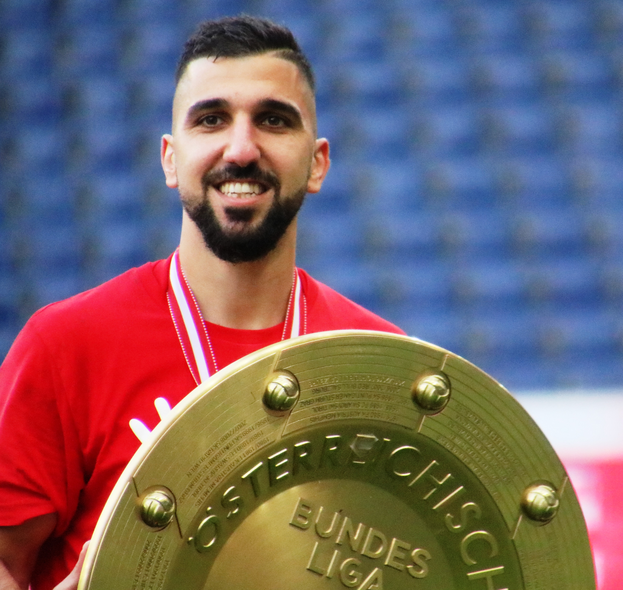 Übergabe des Meistertellers 2018 an FC Red Bull Salzburg